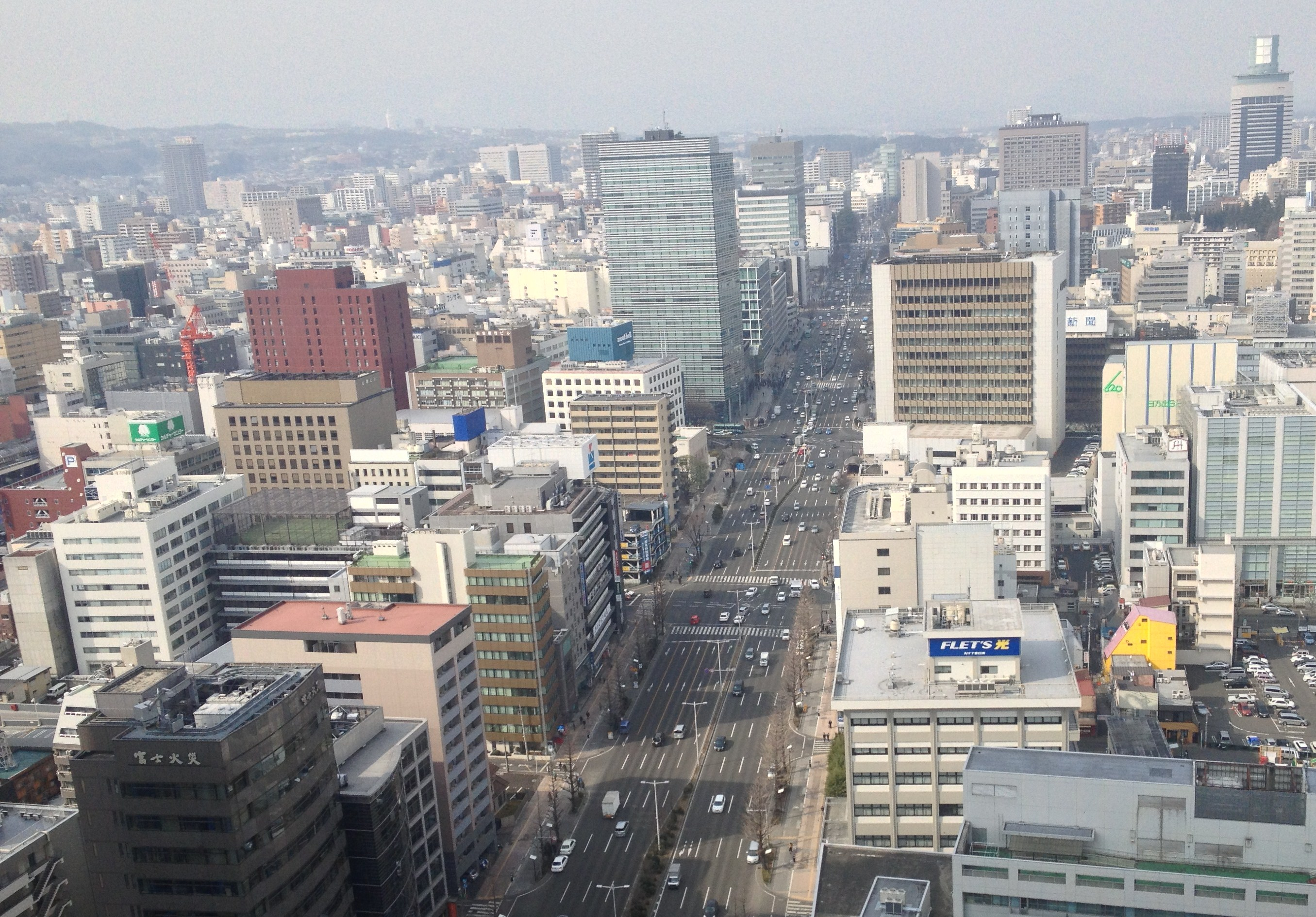 住友生命仙台中央ビルより眺めた東二番丁通り（2013年3月）